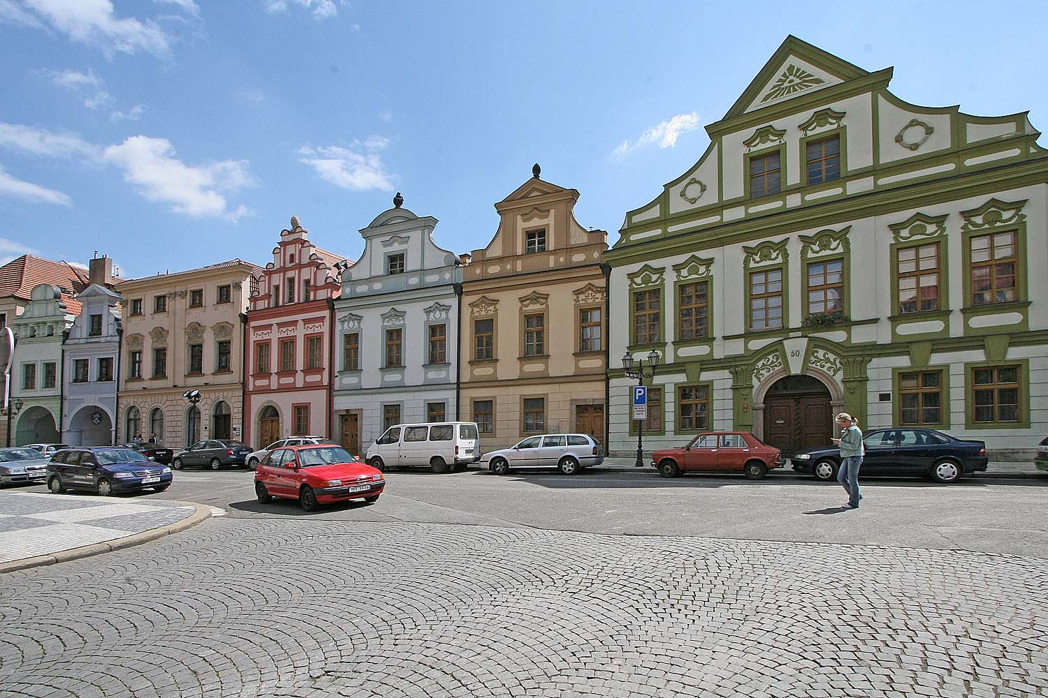 Hradec Králové - Kanovnické domy u katedrály svatého Ducha